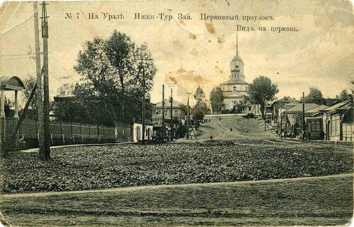 Нижняя Тура, Церковный проулок